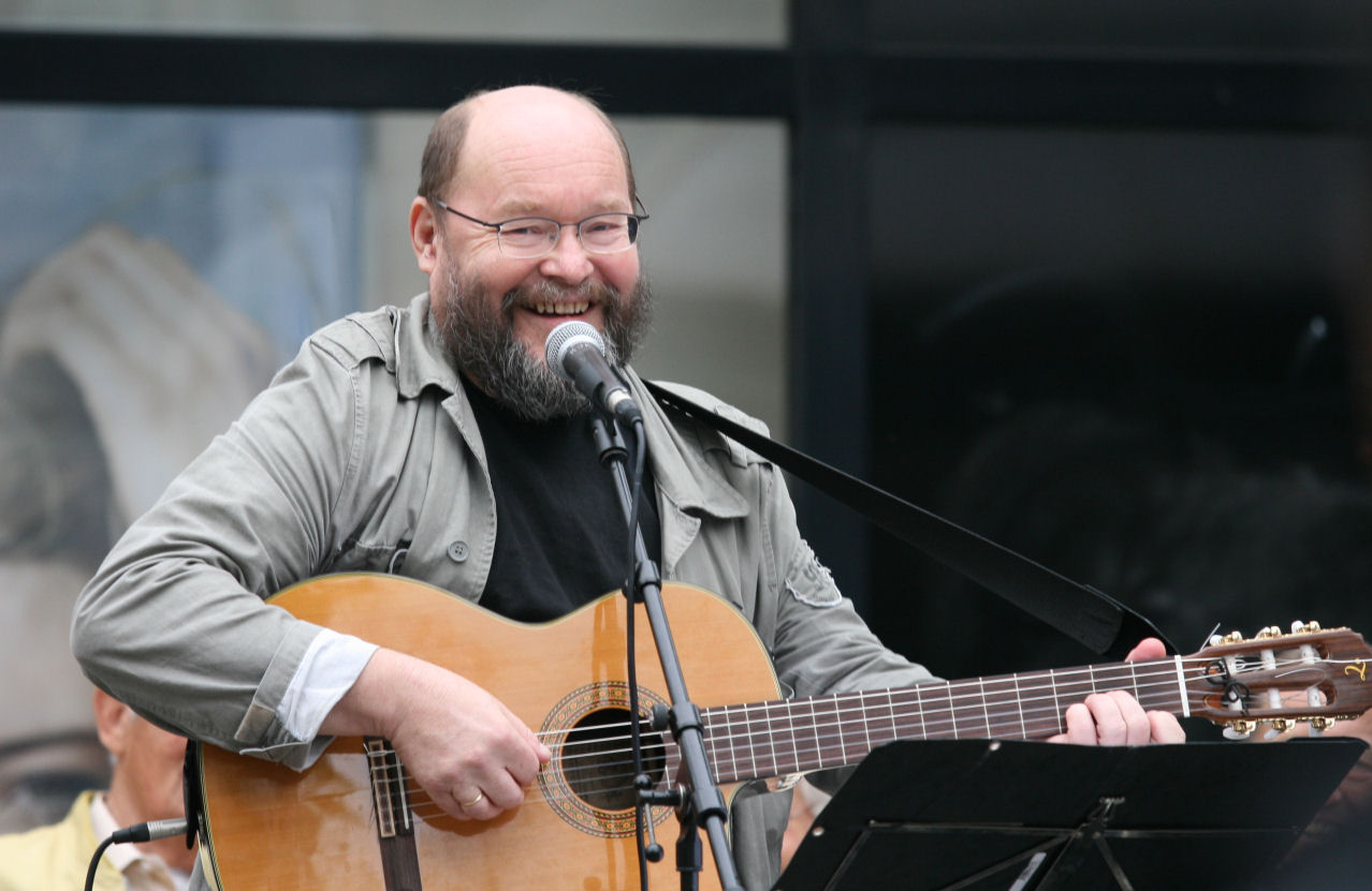 Svein Tang Wa, Norwegian artist